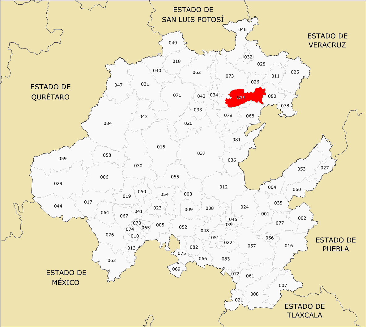 Municipio de Hidalgo